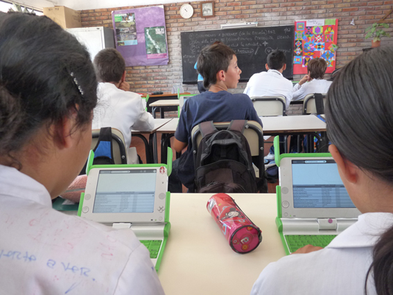 Estudiantes de educación pública utilizando la XO 1.0 (Plan Ceibal, Uruguay, 2010).